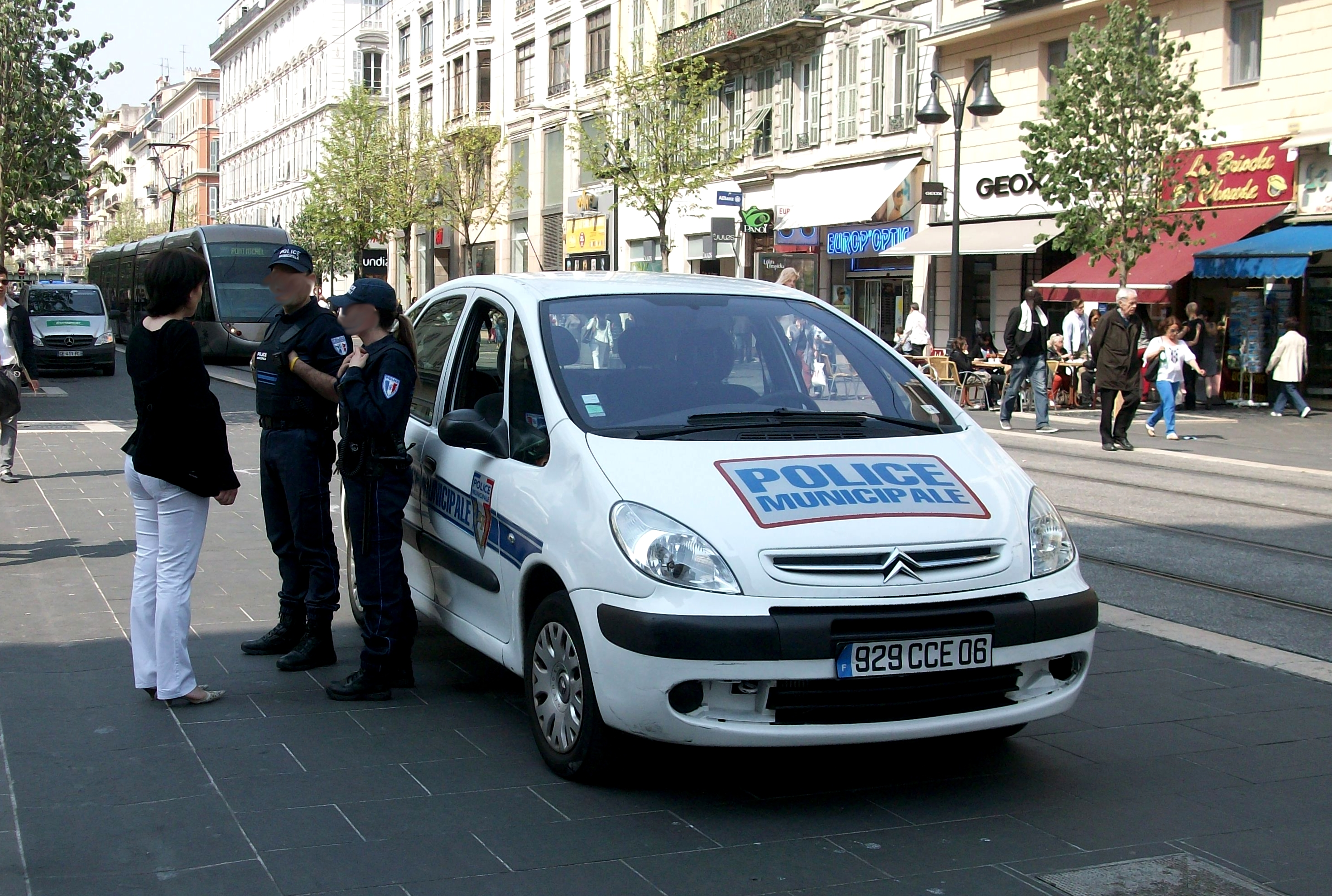 Citroen Xsara Picasso de la police municipale de Nice le long du tramway.